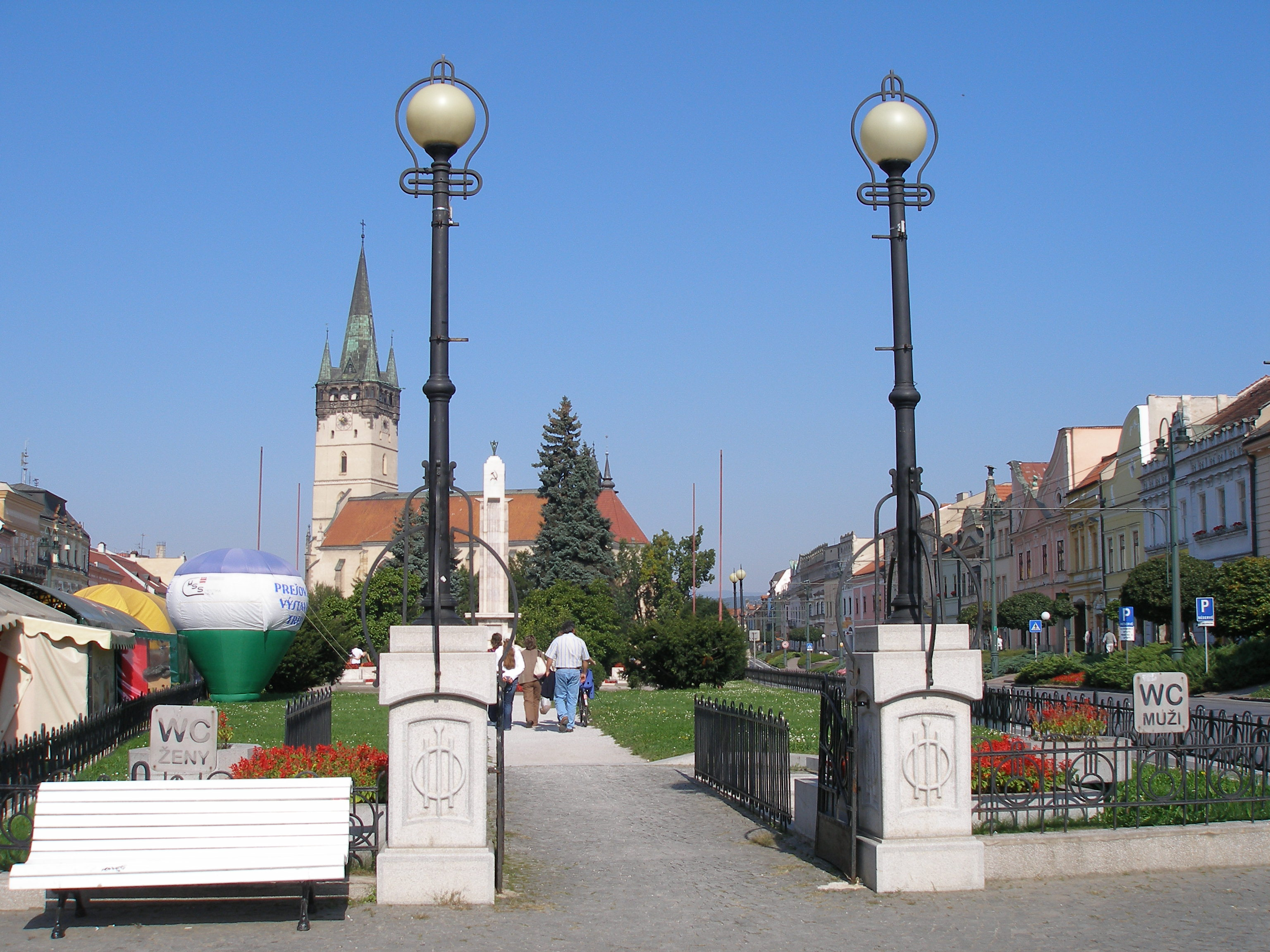 Centrum